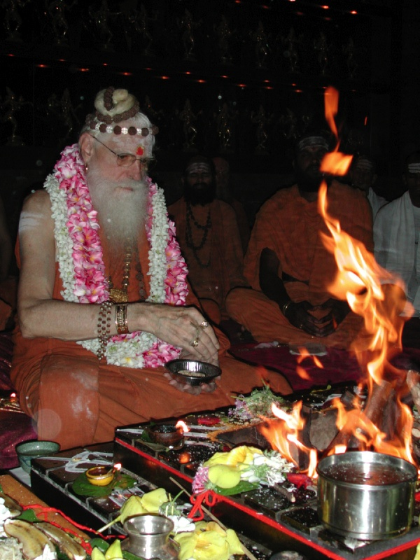 Satguru Sivaya Subramuniyaswami (Gurudeva) at a homa fire in Kadavul Temple, Kauai, Hawaii